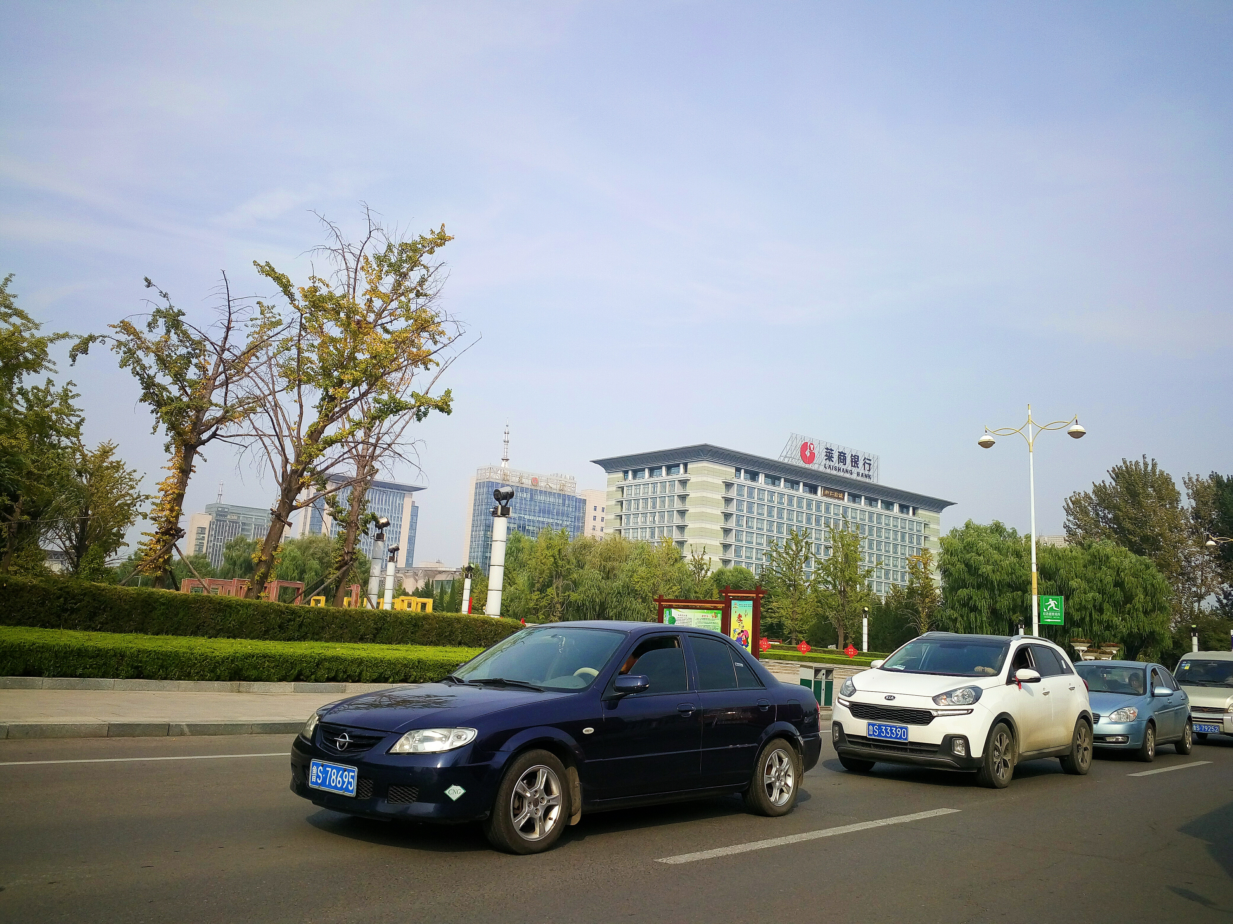 莱芜高新CBD办公区